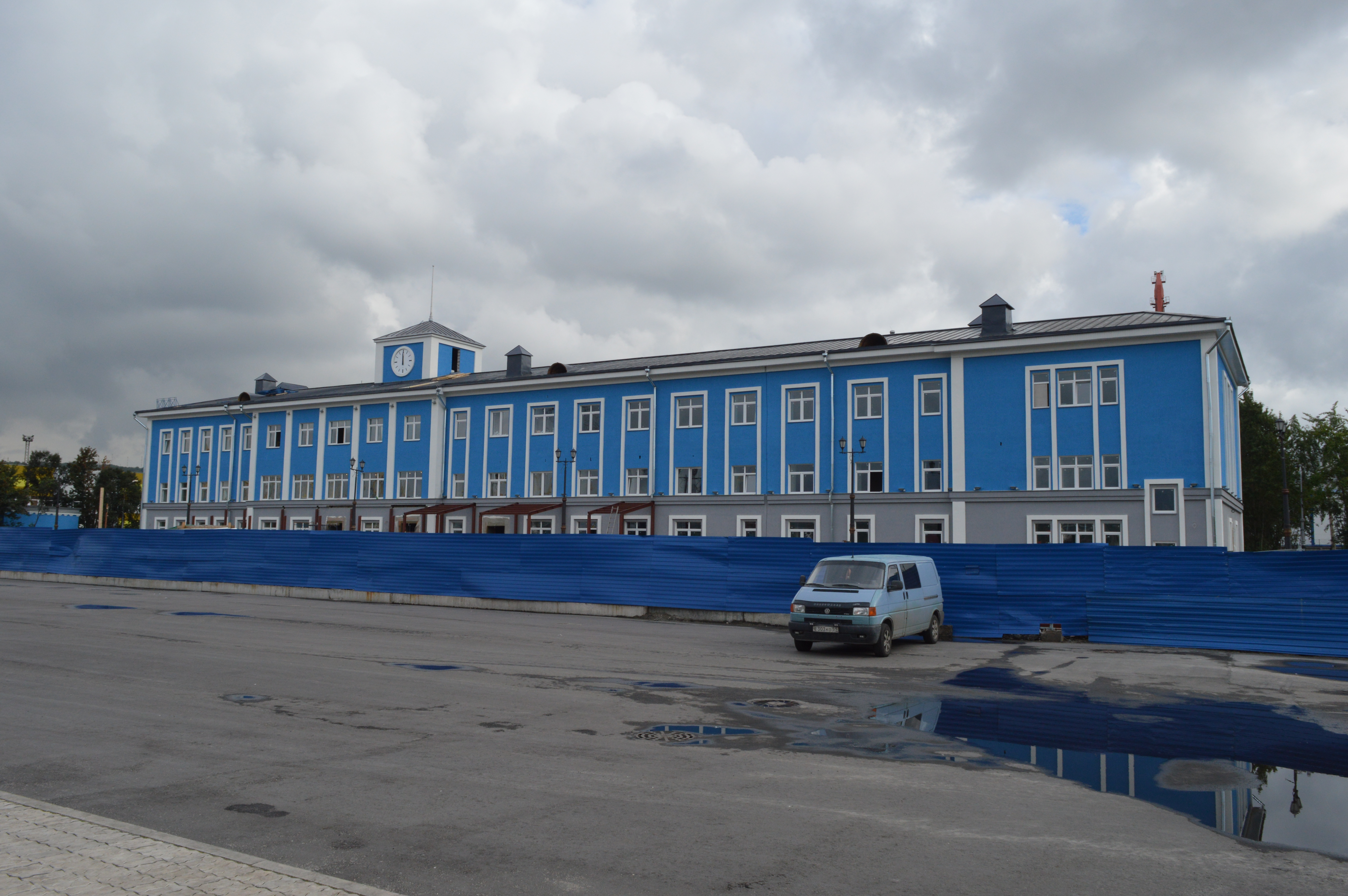 Обновленный морской вокзал